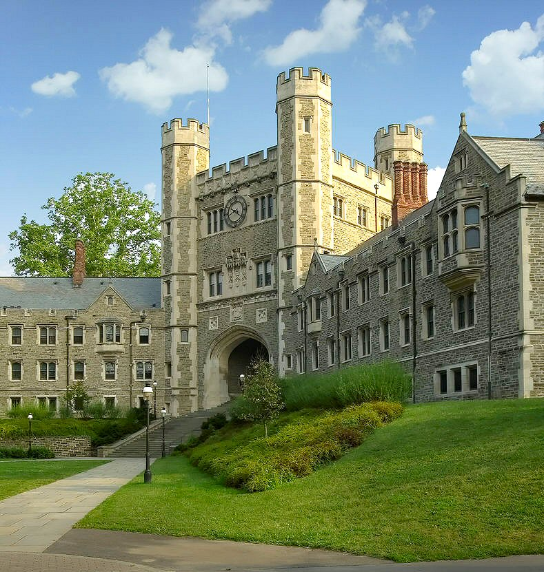 Stronghold Princeton University New Jersey USA Jazz-Face Mod